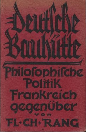 Florens Christian Rang (1864-1924): Deutsche Bauhütte. Philosophische Politik Frankreich gegenüber. Leipzig 1924